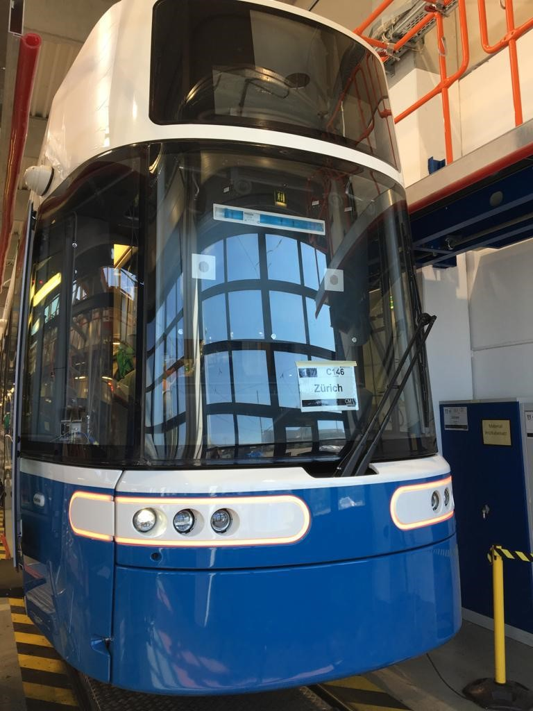 Flexity Zürich Front